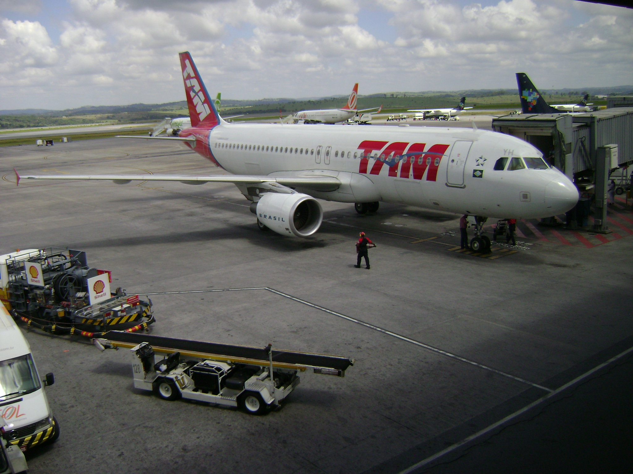 Avião da TAM no Aeroporto Internacional de Belo Horizonte-Confins, em Minas Gerais, Brasil.